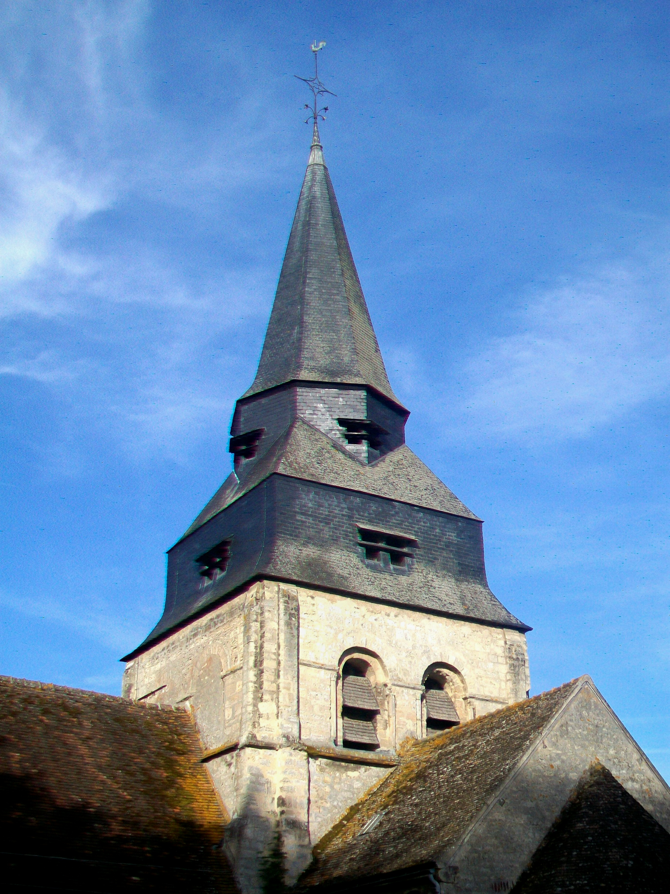 Vue du clocher depuis l'est.